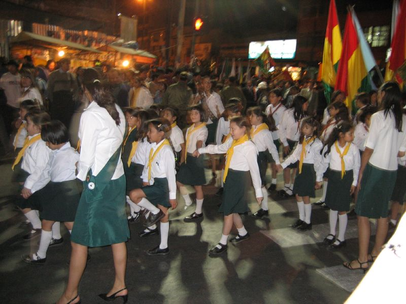 Estudiantes bolivianos, em Cochabamba.